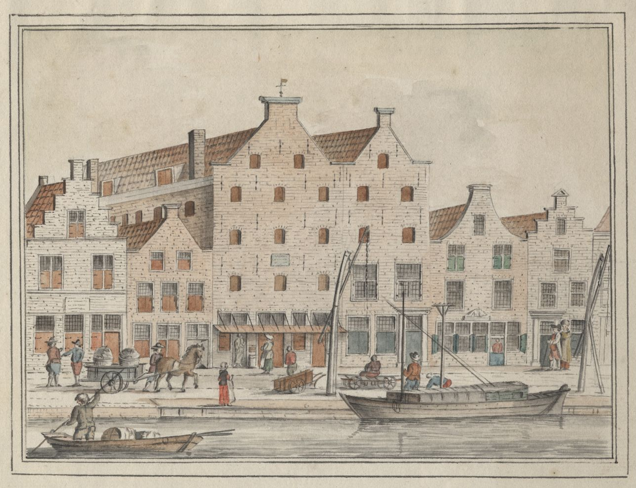 Huiszittenhuis van de Hervormde Diaconie. Met Armenbakkerij, Graanmagazijn en huis van de bediende aan de Oude Rijn 44-46. Voorgevels met rechts twee huizen (48-50) met op de voorgrond het vertrekpunt met kranen en schip van het Amsterdamse veer. Jacob Timmermans.